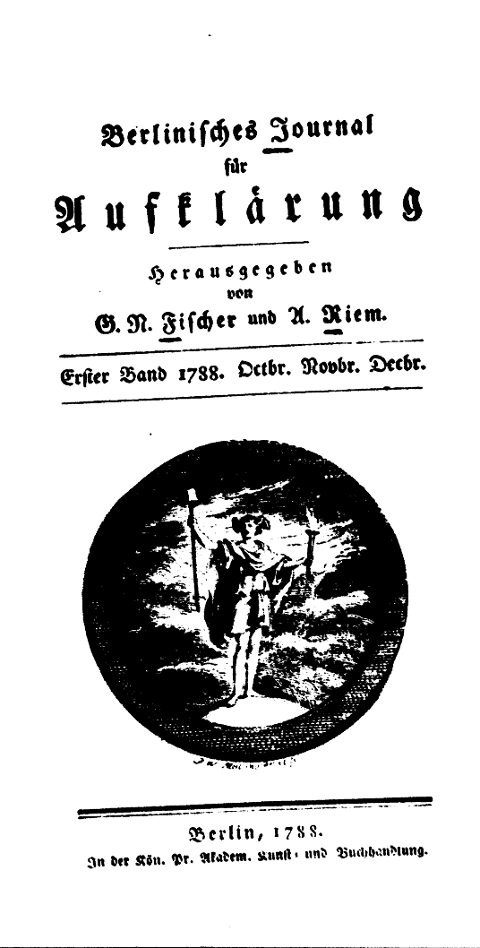 1788-1790 Berlinisches Journal für Aufklärung